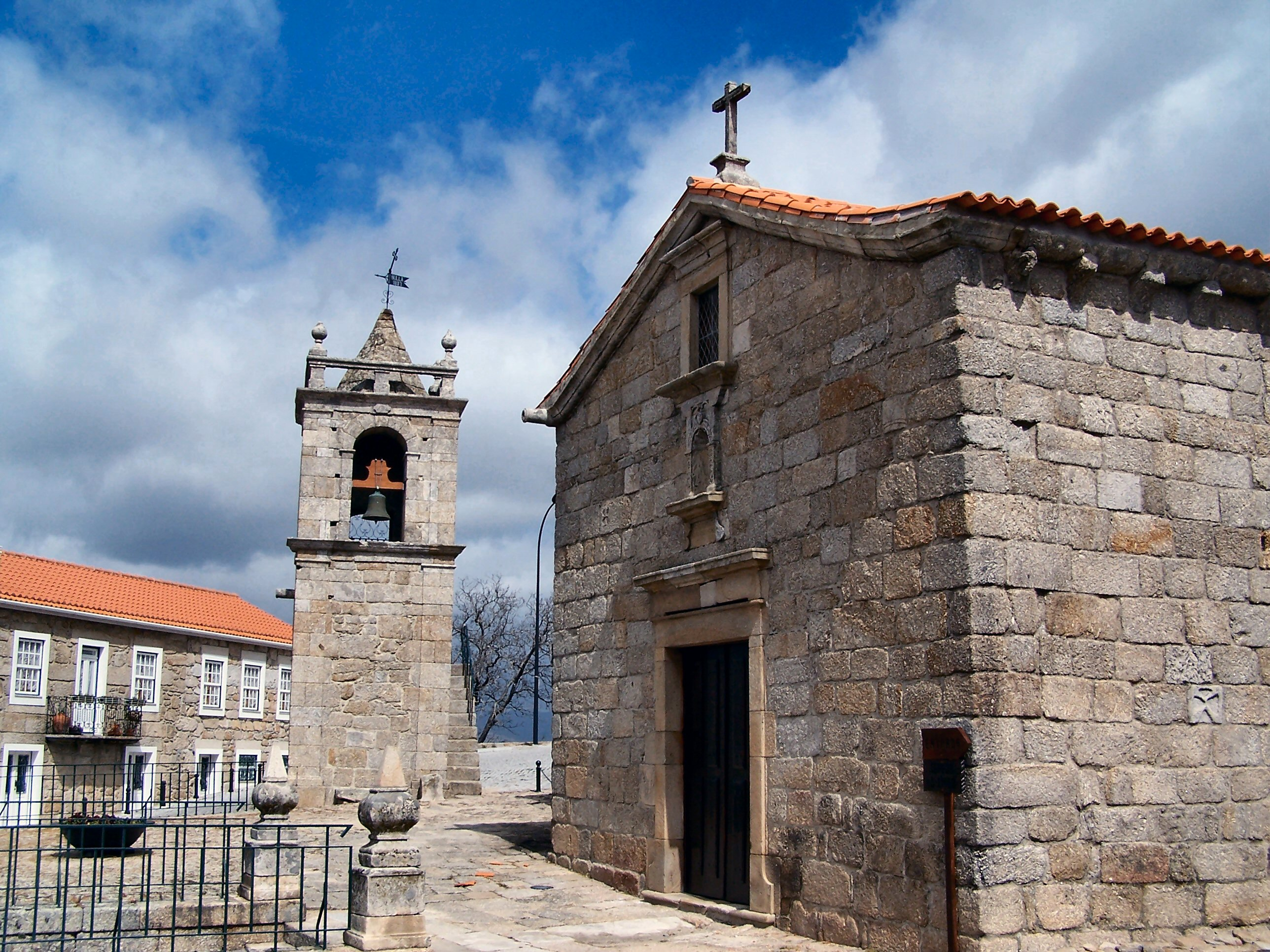 Igreja de S. Tiago com a Torre em Belmonte